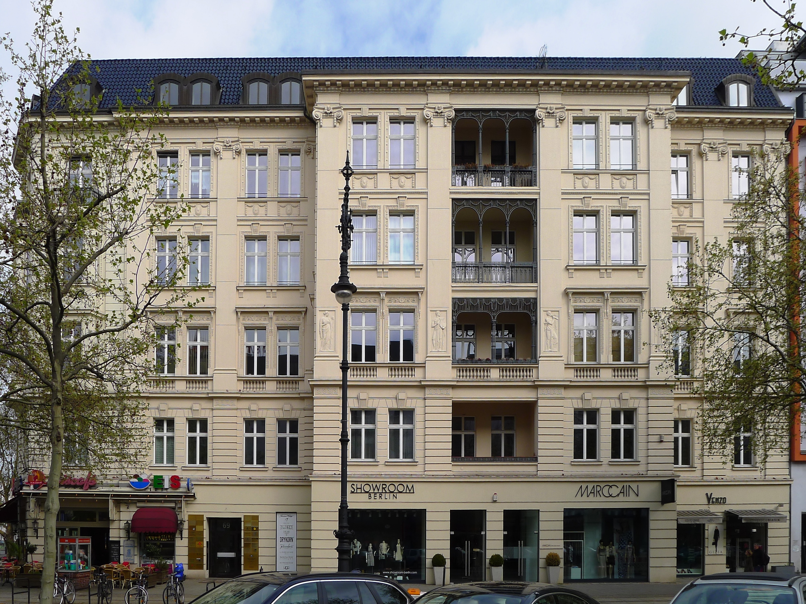 Mietshaus